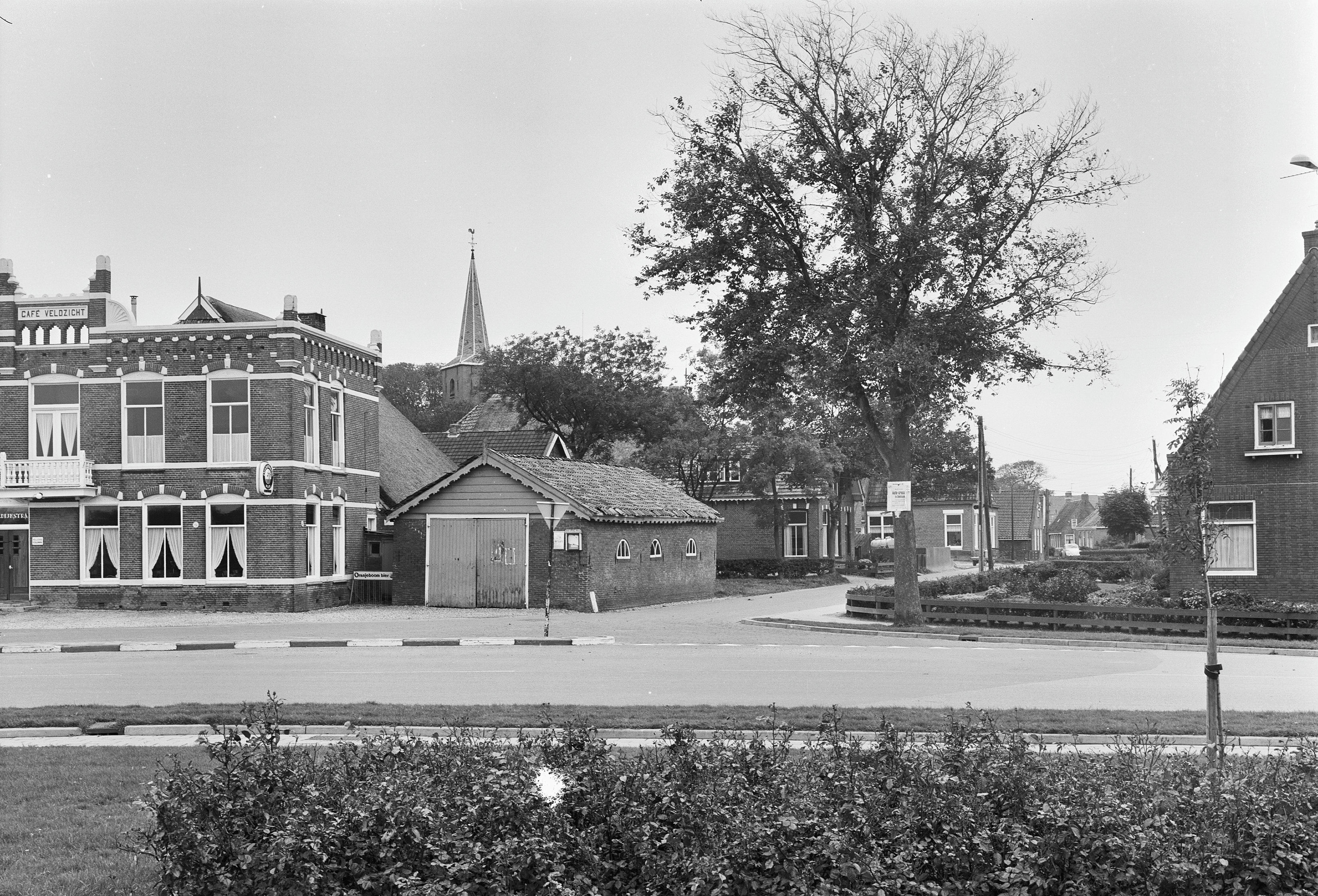 overzicht